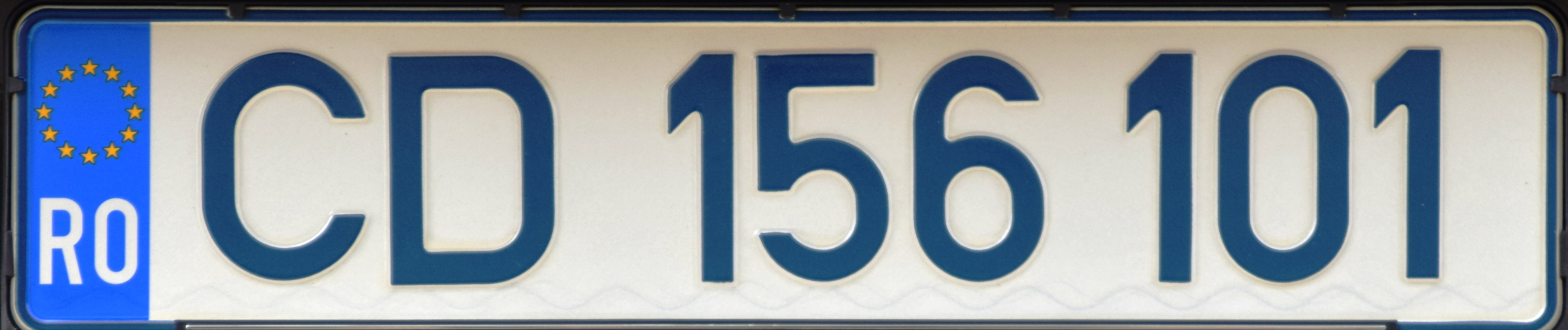 CD kenteken Roemenië (Rusland)